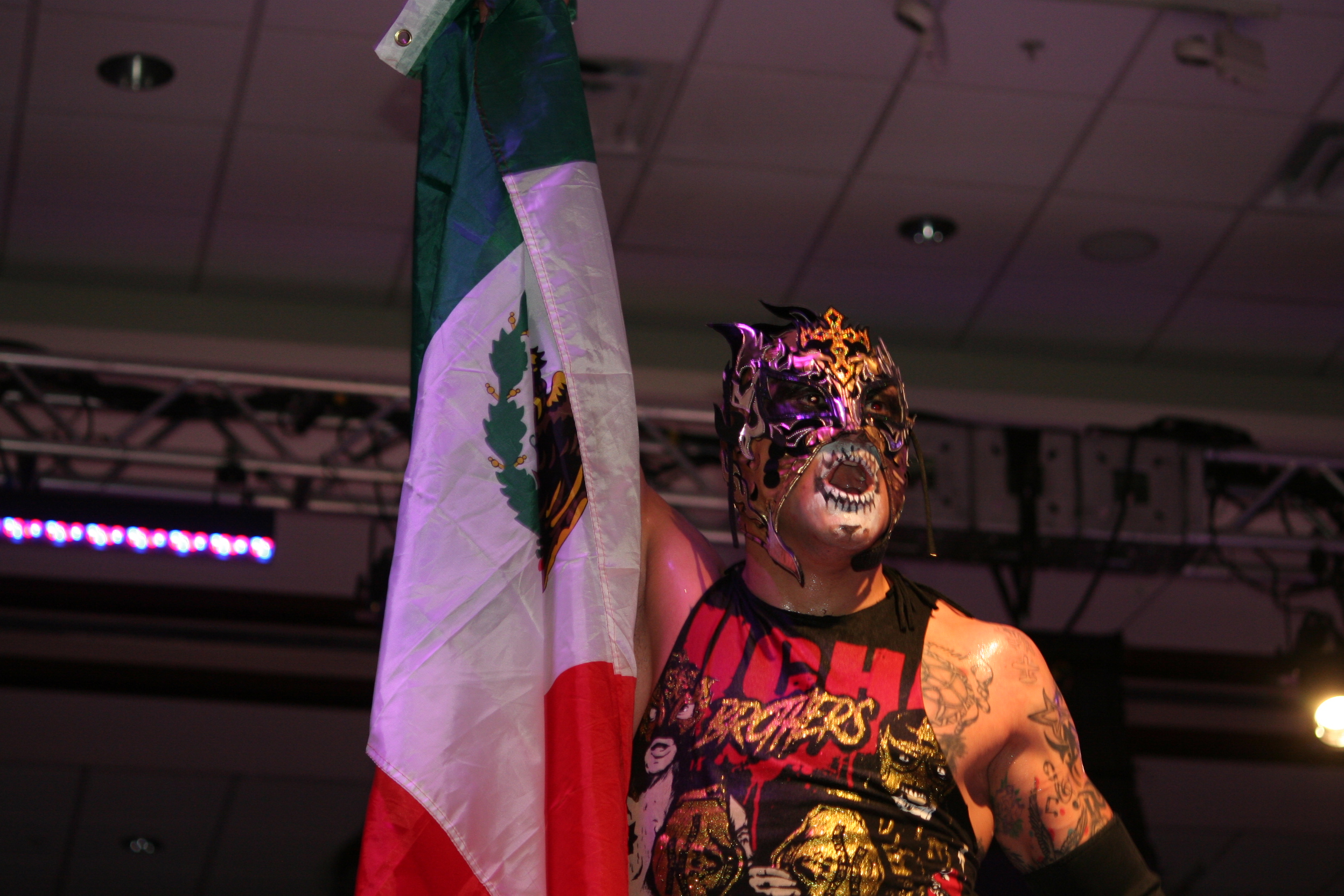 Le catcheur Fenix brandissant le drapeau mexicain en 2017.